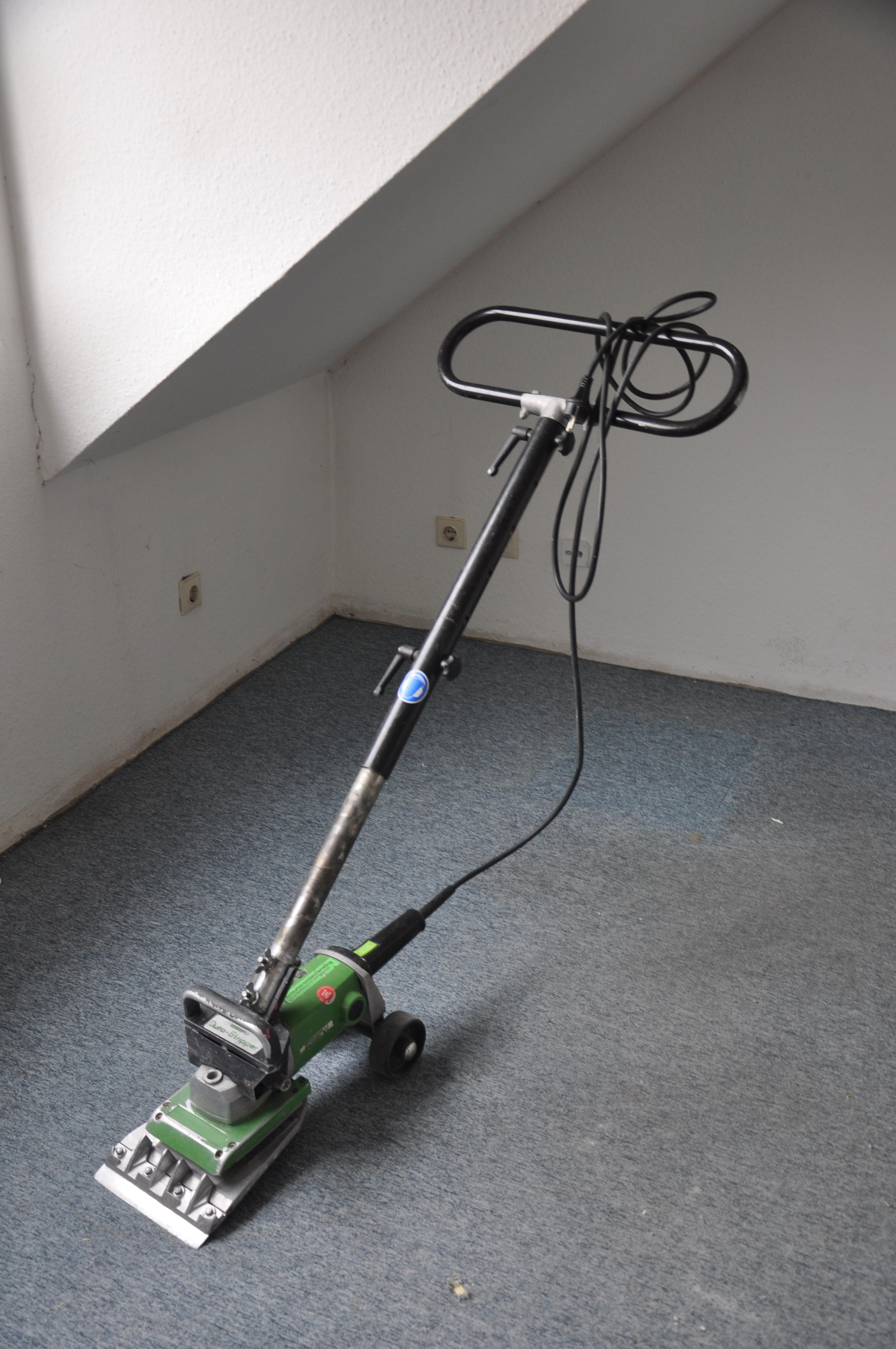 Komplettansicht eines Teppich-Strippers zum entfernen von Teppich oder ähnlichen Bodenbelägen.